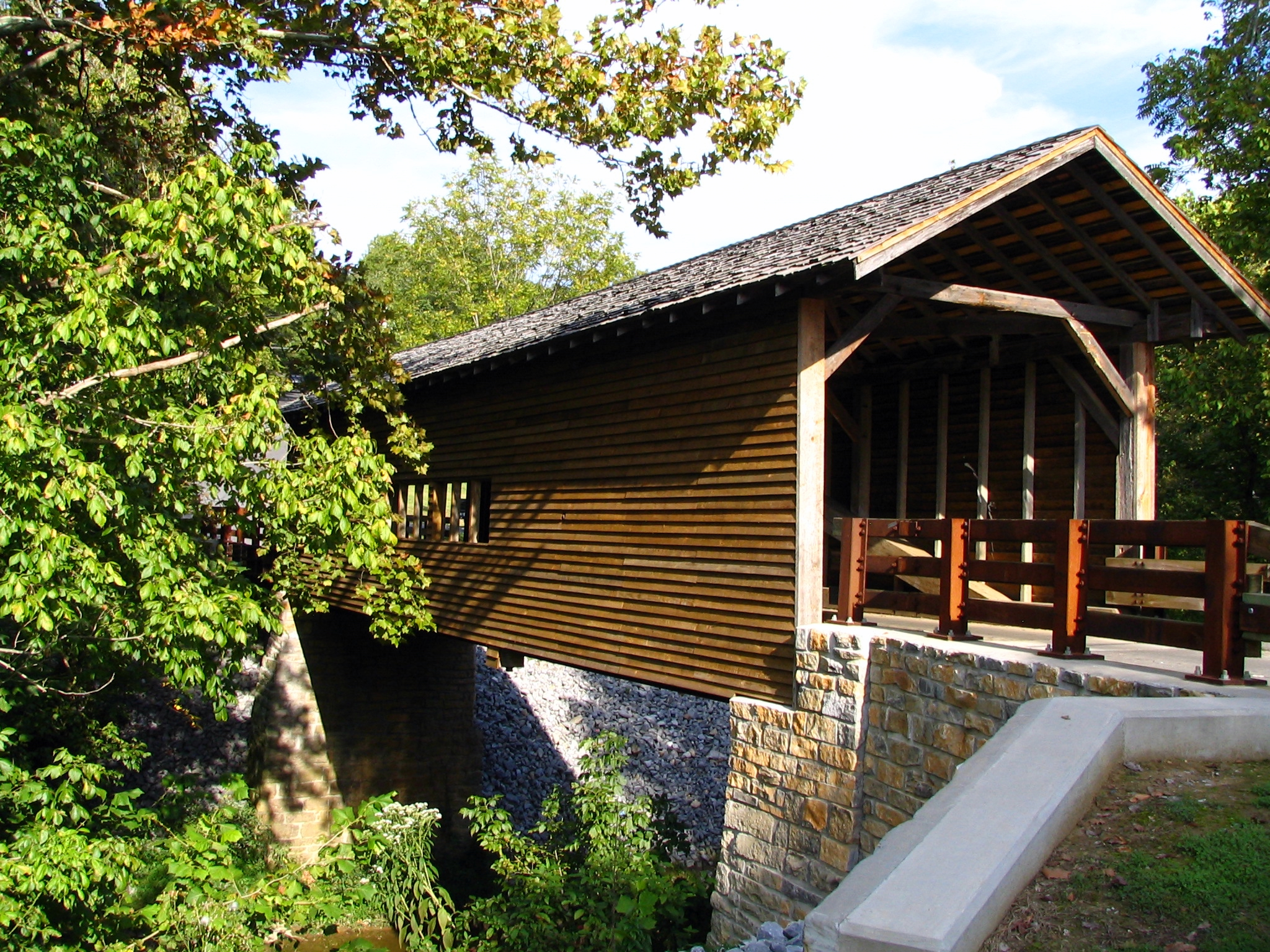 Harrisburg Covered Bridge